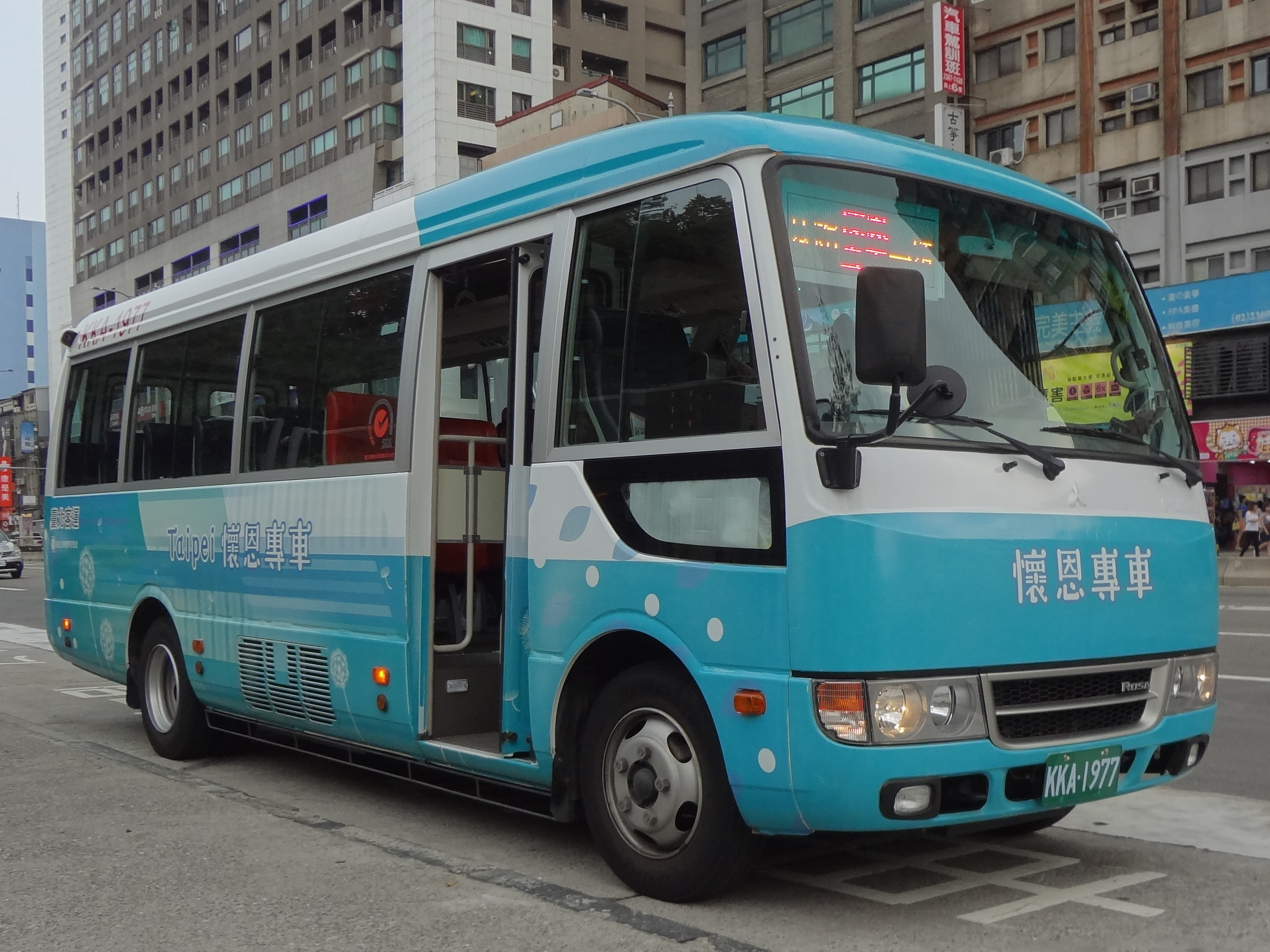 臺北客運Fuso Rosa中型巴士KKA-1977行駛臺北市殯葬管理處懷恩專車，停靠臺北捷運公館站。